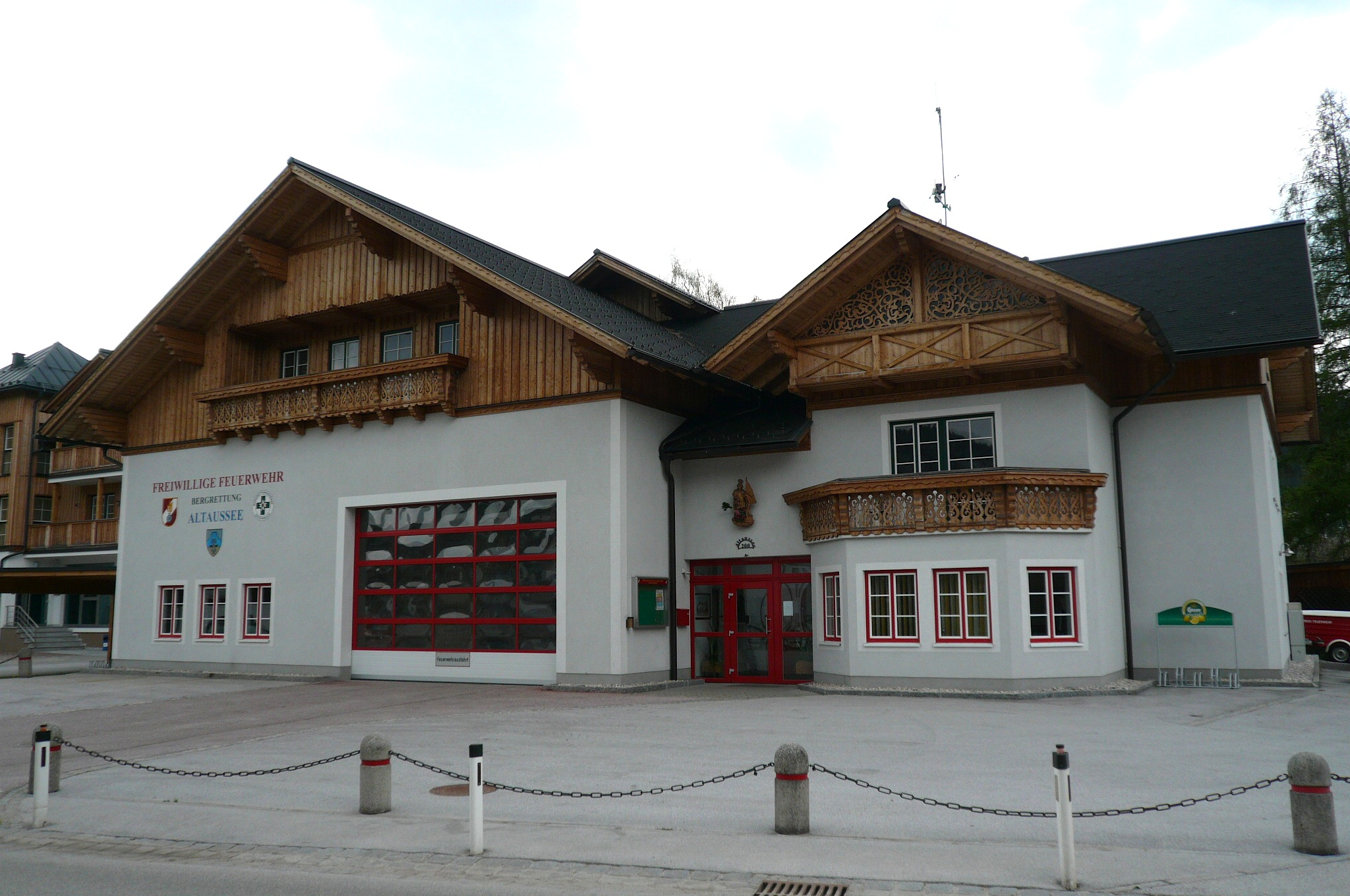 Zeughaus Freiwillige Feuerwehr Altaussee